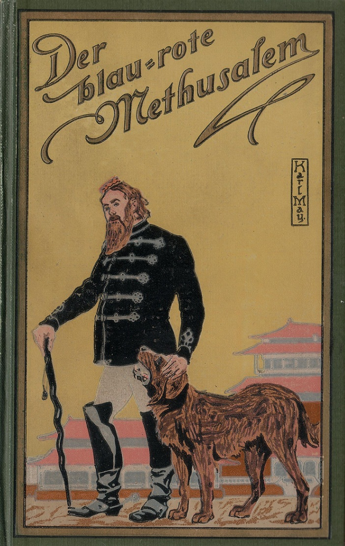 Georg Lebrecht Bucheinband Karl May: Der blaurote Methusalem